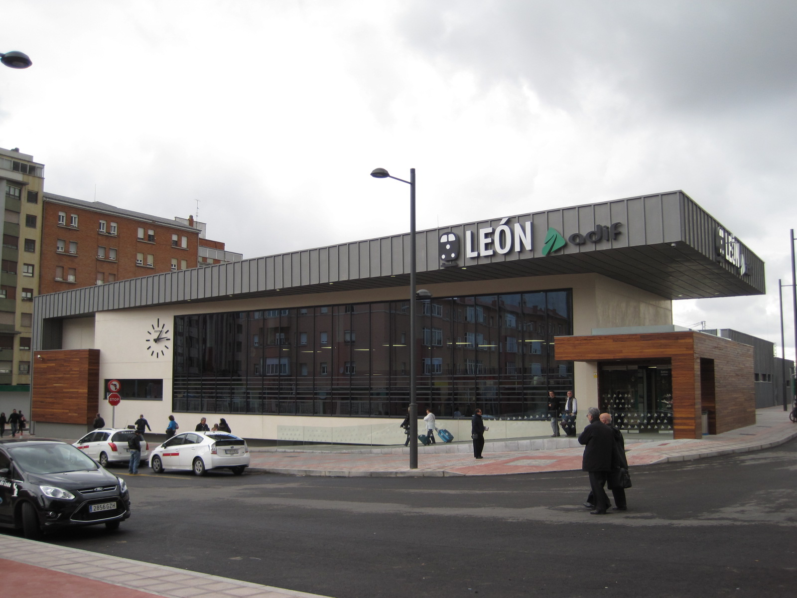 Vista de la estación provisional de ferrocarril de León (España).